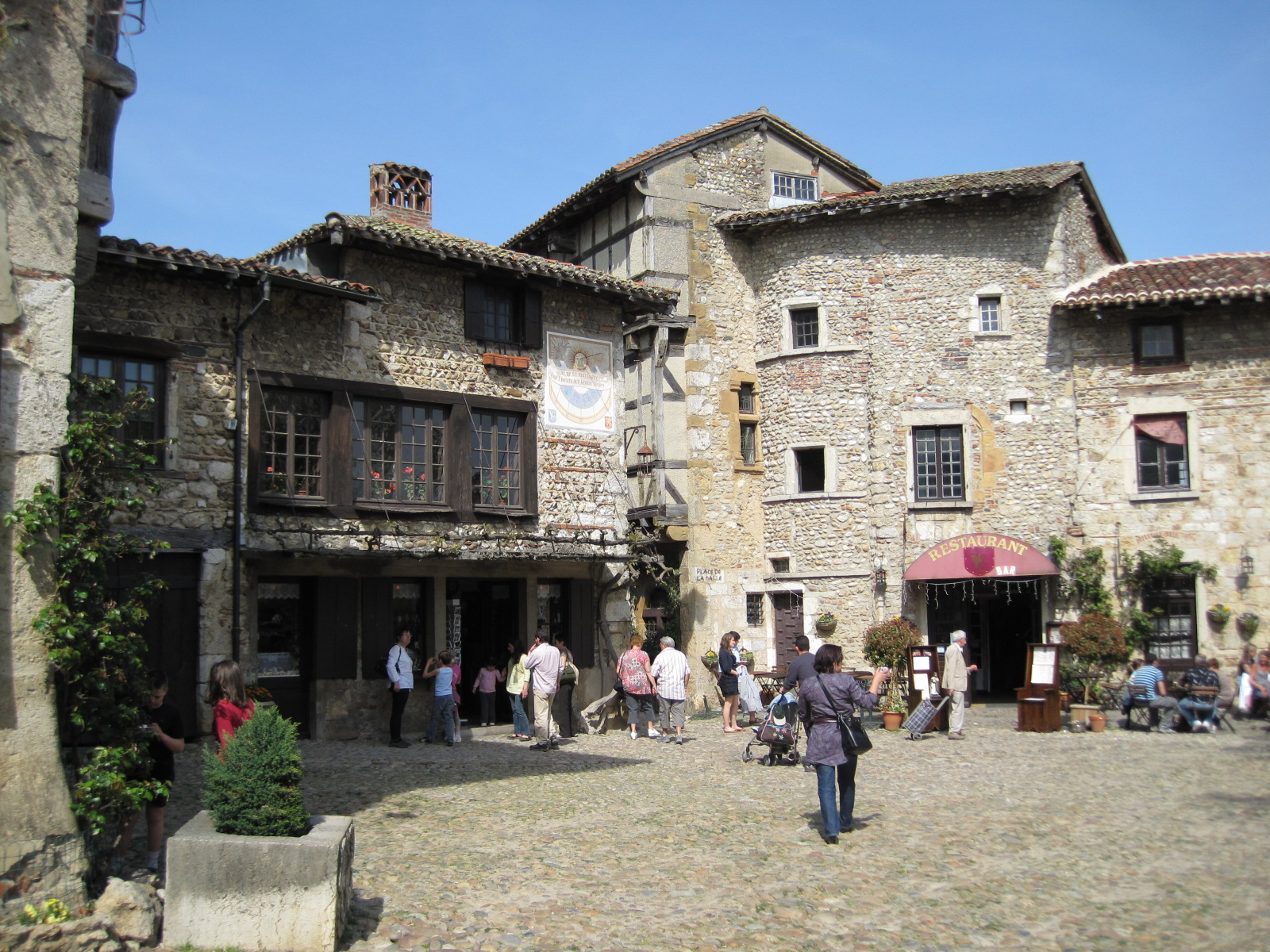 Pérouges